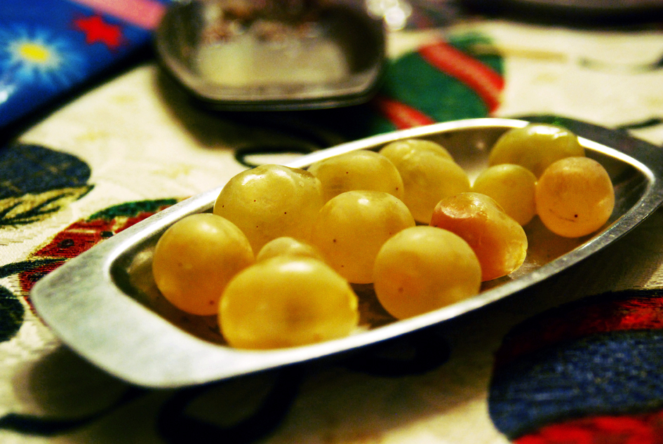 Dotze grans de raïm, per Cap d'Any.